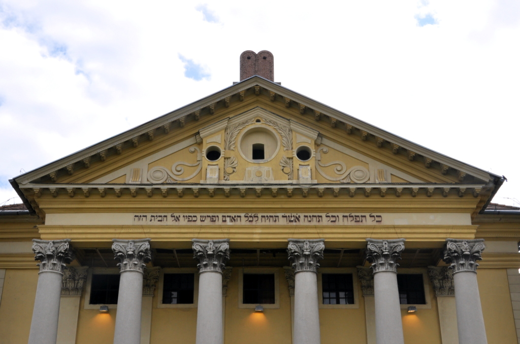 Óbuda Synagogue, Budapest District III